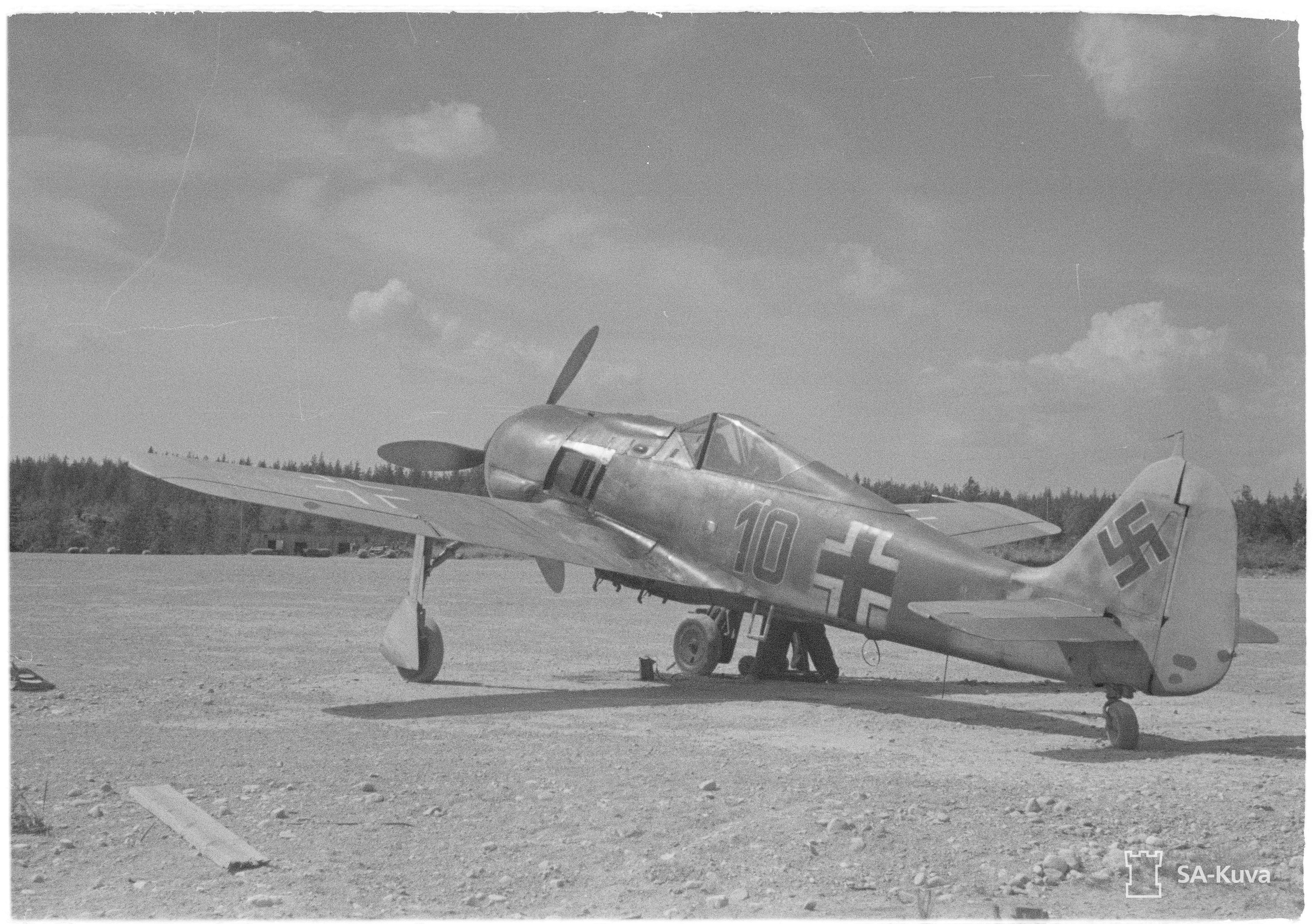 Focke Wulf Jabo hävittäjä- ja pommittajakone. (Kuvassa 1./SG 5:n Focke-Wulf Fw 190 F-8, musta 10). Kuvauspaikka: Immolan lentokenttä.